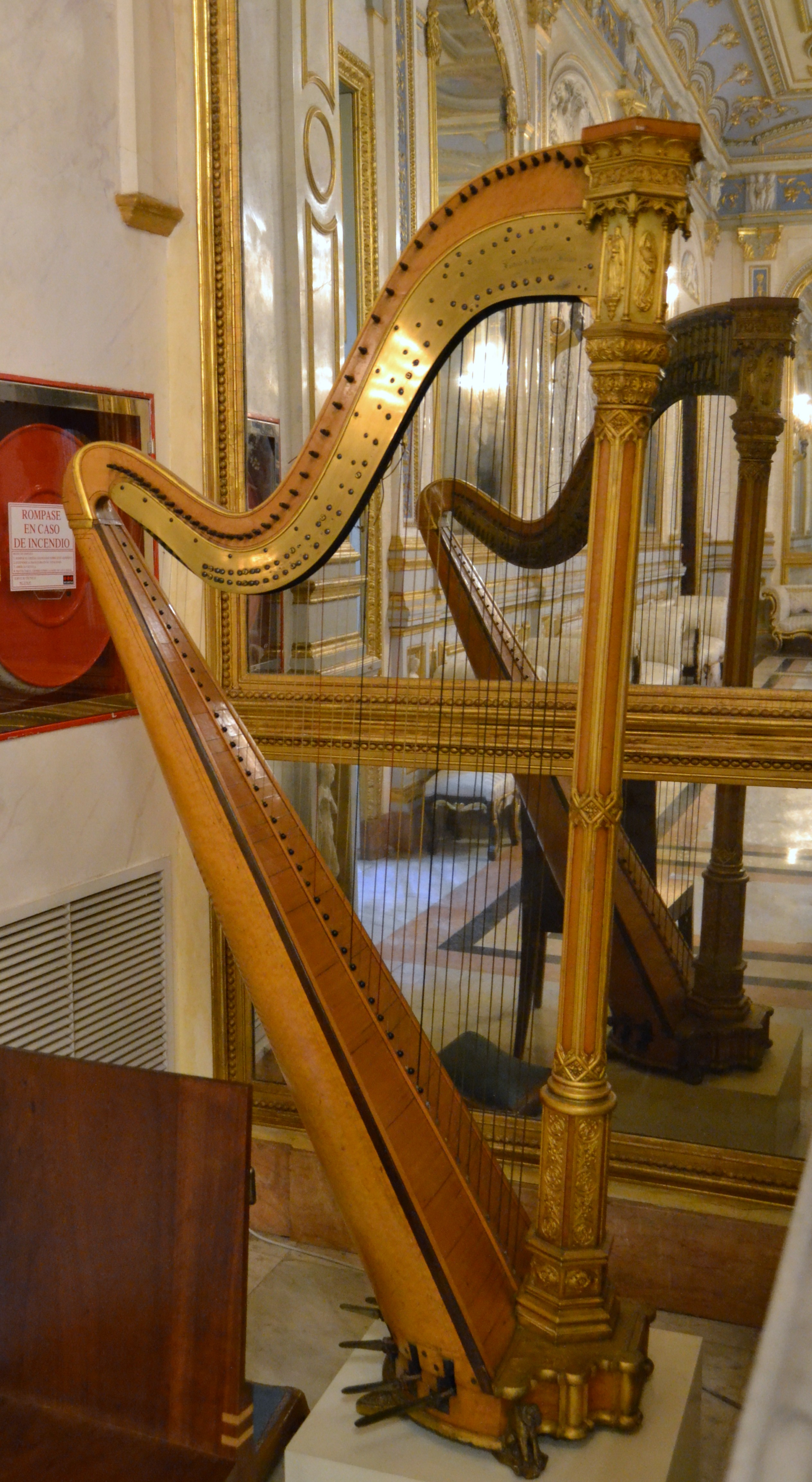 Arpa Érard, fusta lacada i daurada, bronze i corde de budell, París segle XIX. Saló de ball del palau del marqués de Dosaigües, València.